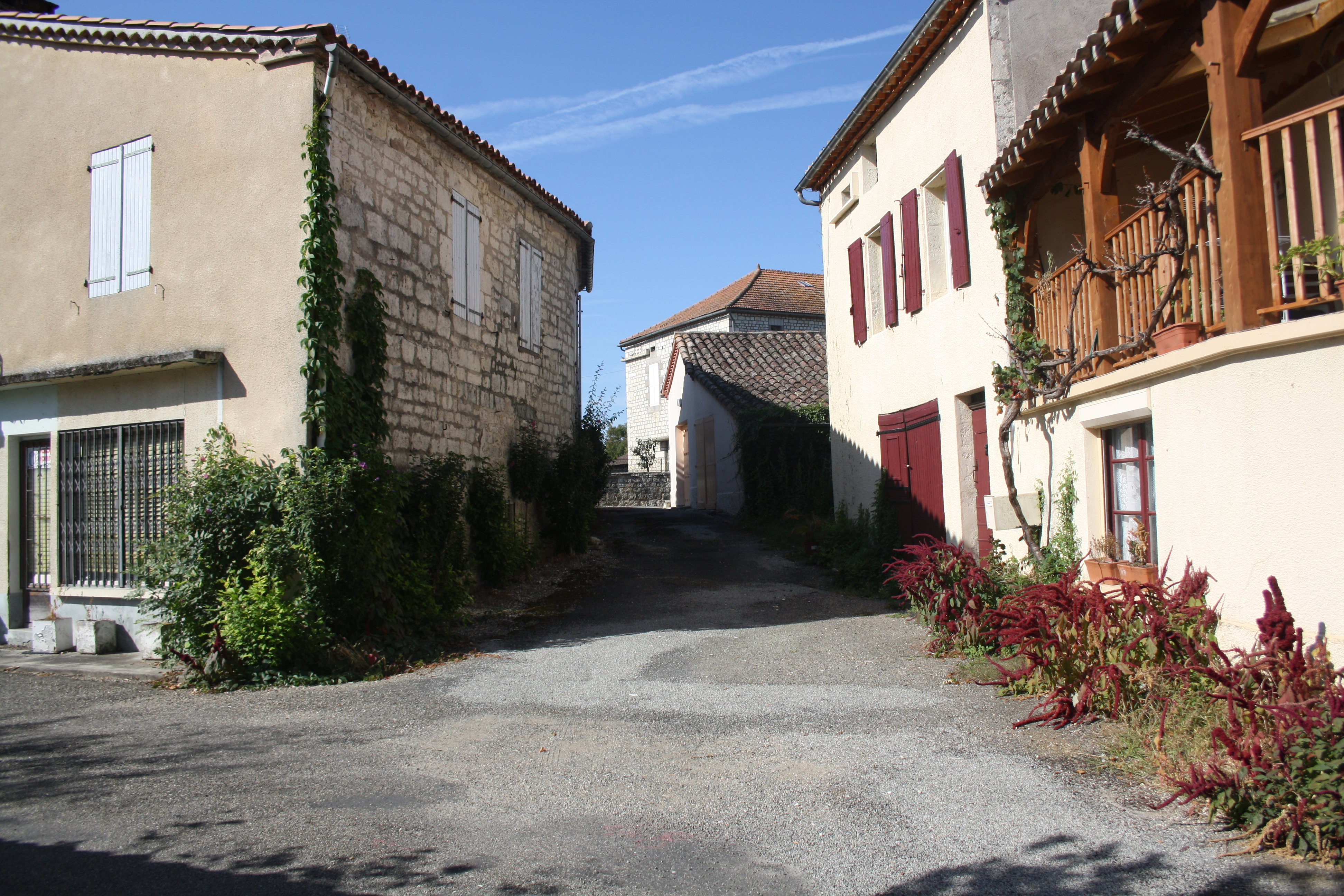 Rue de Fontanes, Lot (France).